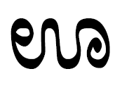 додда у